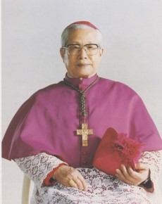 中文（台灣）: 天主教新竹教區劉獻堂主教